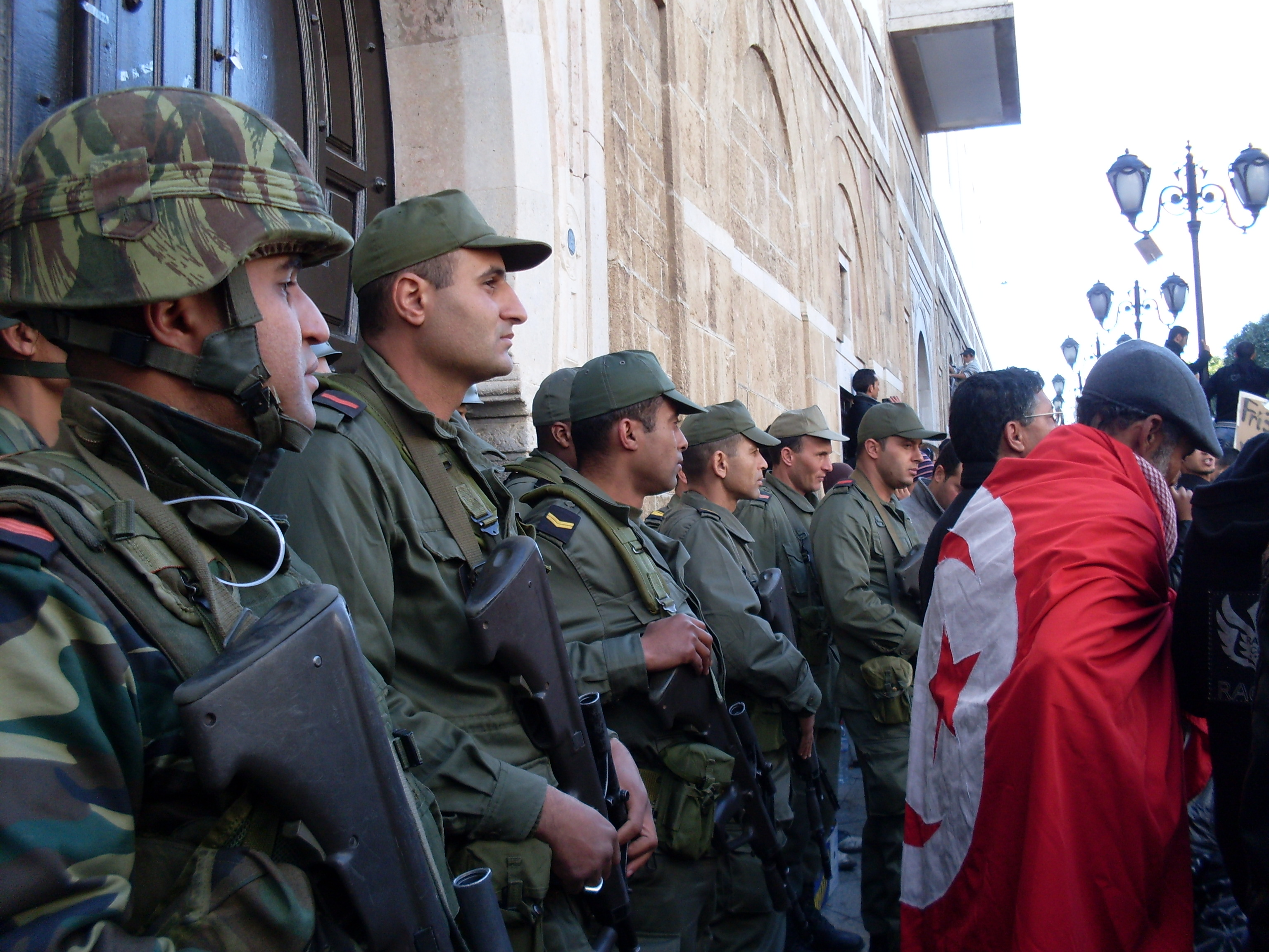 soldat protegant la porte d'entrée du premier ministère, manifestations à la place du gouvernement lors de la Caravane de la libération suite à la révolution des Jasmins